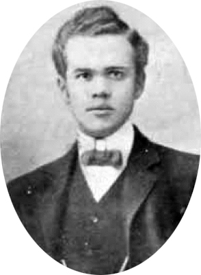 Imagen del caricaturista chileno Nataniel Cox Méndez (Pug) (1881 - 1908) Qué es la caricatura de Ramón Columba